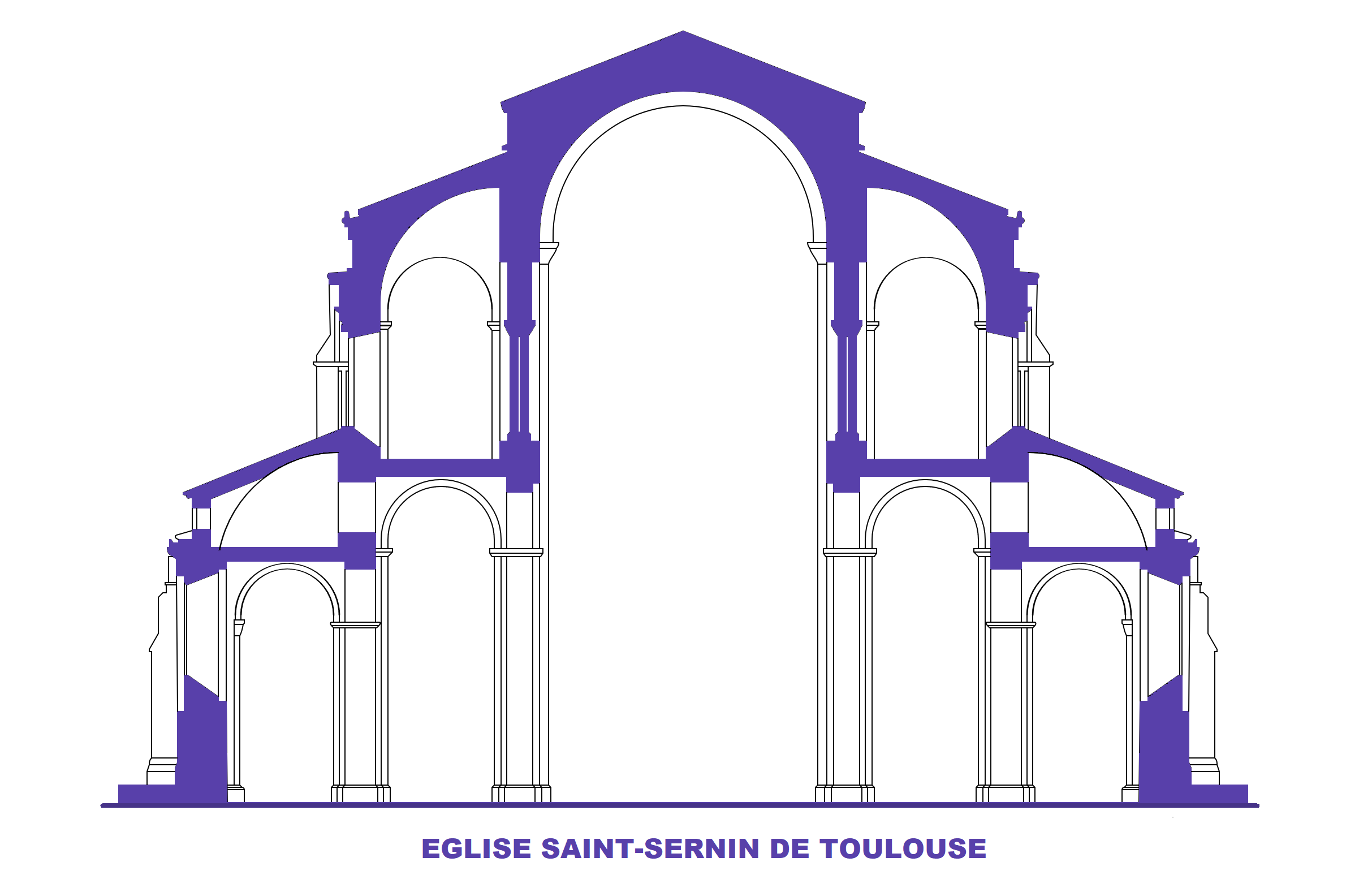 Eglise Saint-Sernin de Toulouse, Coupe (image Commons modifiée)